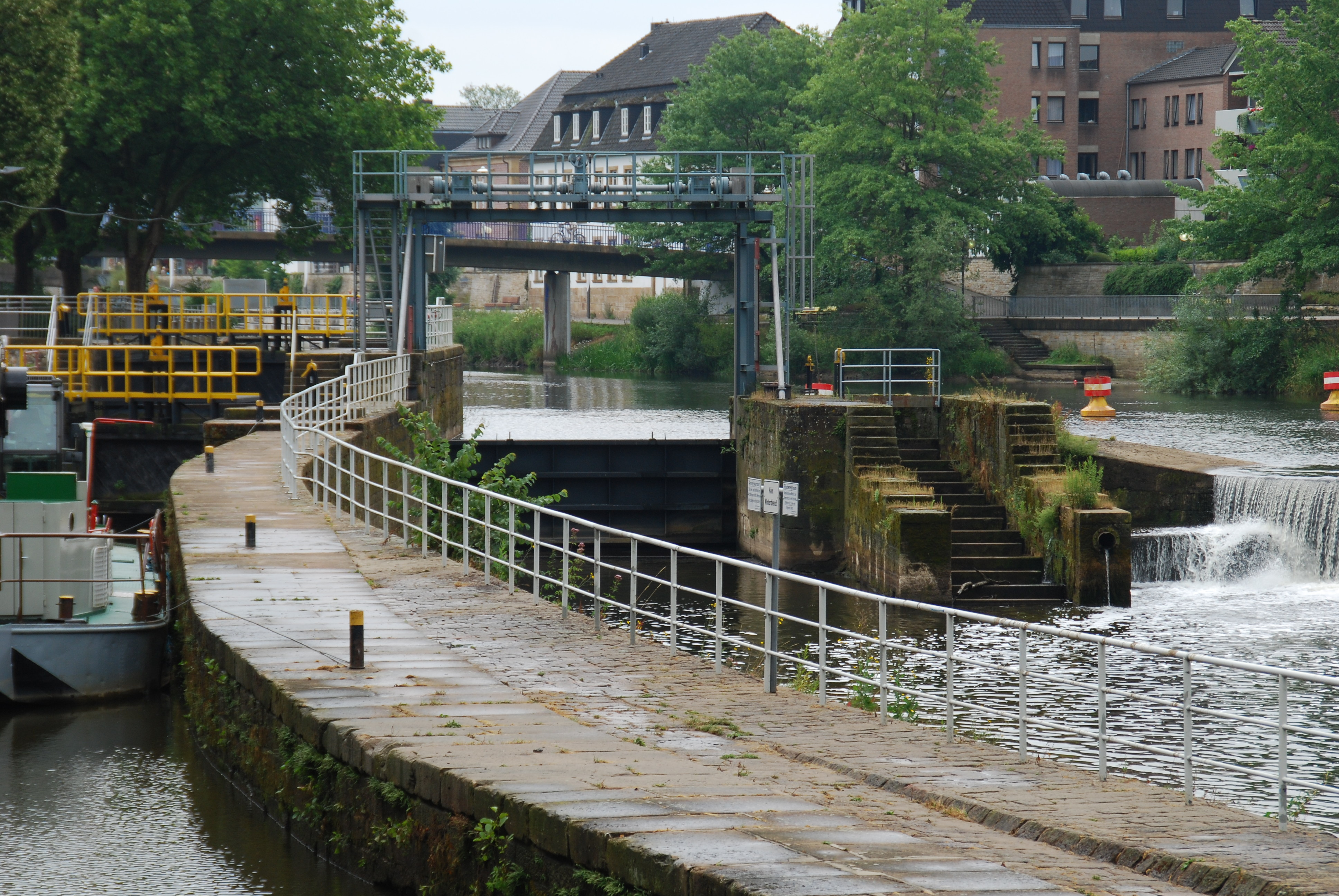 Fluttor und Fischpass (Schlitzpass, rechts der Bildmitte) am Emswehr Rheine